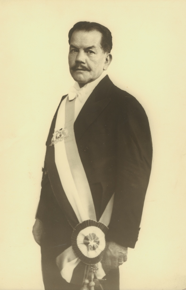 Pedro Avelino Aguirre Cerda (*6 de febrero de 1879 — †25 de noviembre de 1941), político, abogado y educador chileno, Presidente de Chile entre 1938 y 1941, año en que falleció. Militante del partido radical, bajo su gobierno dio gran impulso a la educación, bajo el lema “gobernar es educar”. Popularmente se le conocía como "Don Tinto", por su vinculación a la industria vitivinícola.